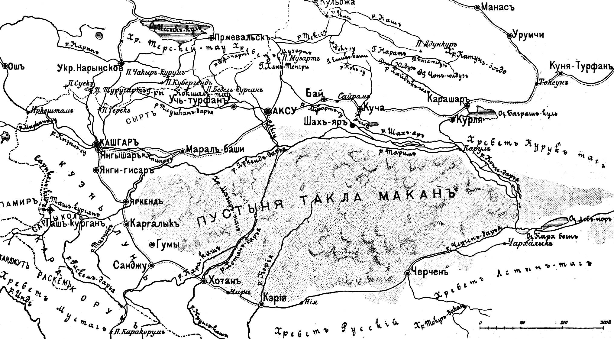 Это изображение было использовано для иллюстрирования статьи «Кашгария» опубликованной в двенадцатом томе «Военной энциклопедии», который был издан книгоиздательским товариществом И. Д. Сытина в 1913 году в столице Российской империи городе Санкт-Петербурге. Более подробное описание к этой картинке можно прочесть в указанной выше статье.